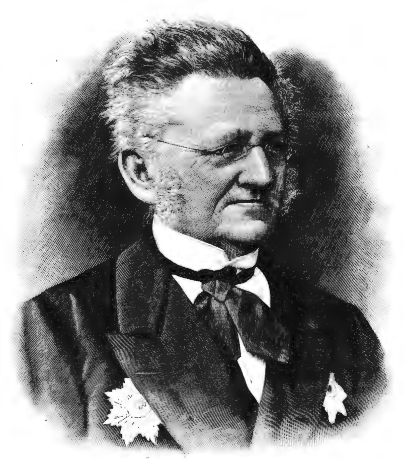 Траутфеттер, Рудольф Эрнестович